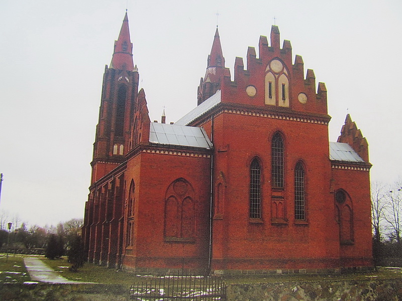 Рэпля. Неагатычны касцёл